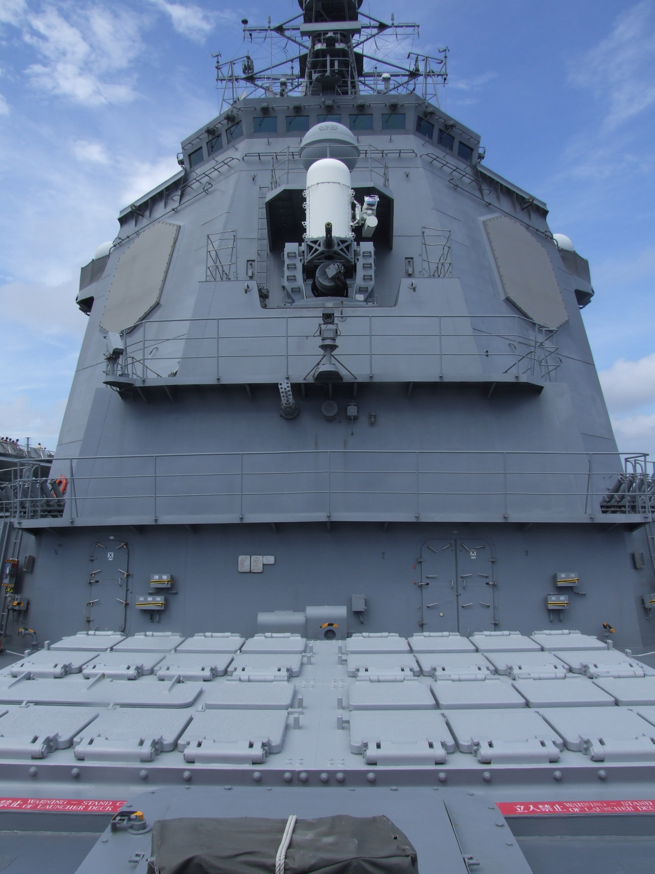 きりしまの艦橋（横浜港開港150年での艦内開放にて撮影）